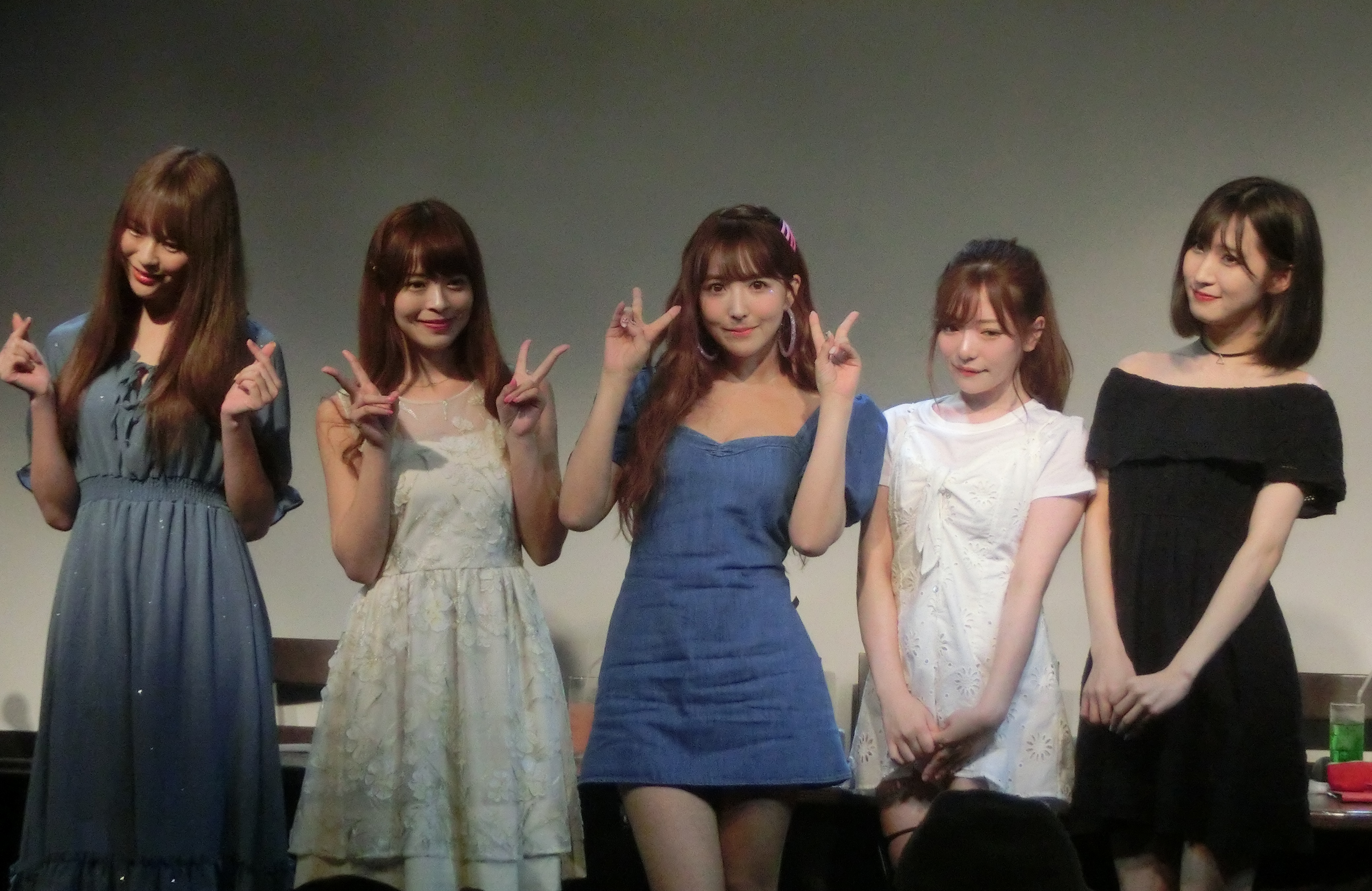 2019年7月23日、渋谷LOFT9「三上悠亜とK-POPを聴く夜・第二夜」